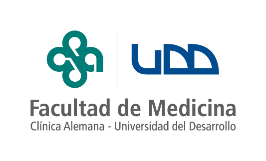 Facultad de Medicina Clínica Alemana UDD